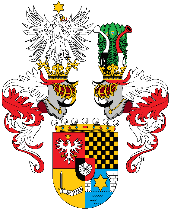 Wappen der beiden Söhne (Felix und Eugen) des k.u.k. Geheimen Rates und Generals der Infanterie i.R. Anton Gartner Edlen von Romansbrück, verliehen anlässlich ihrer Erhebung in den österreichischen Freiherrenstand mit dem zusätzlichen Prädikat "Machtenhofen" 1918. Zeichnung von Gerd Hruška ( Für weitere Informationen zu dieser Standeserhebung siehe (